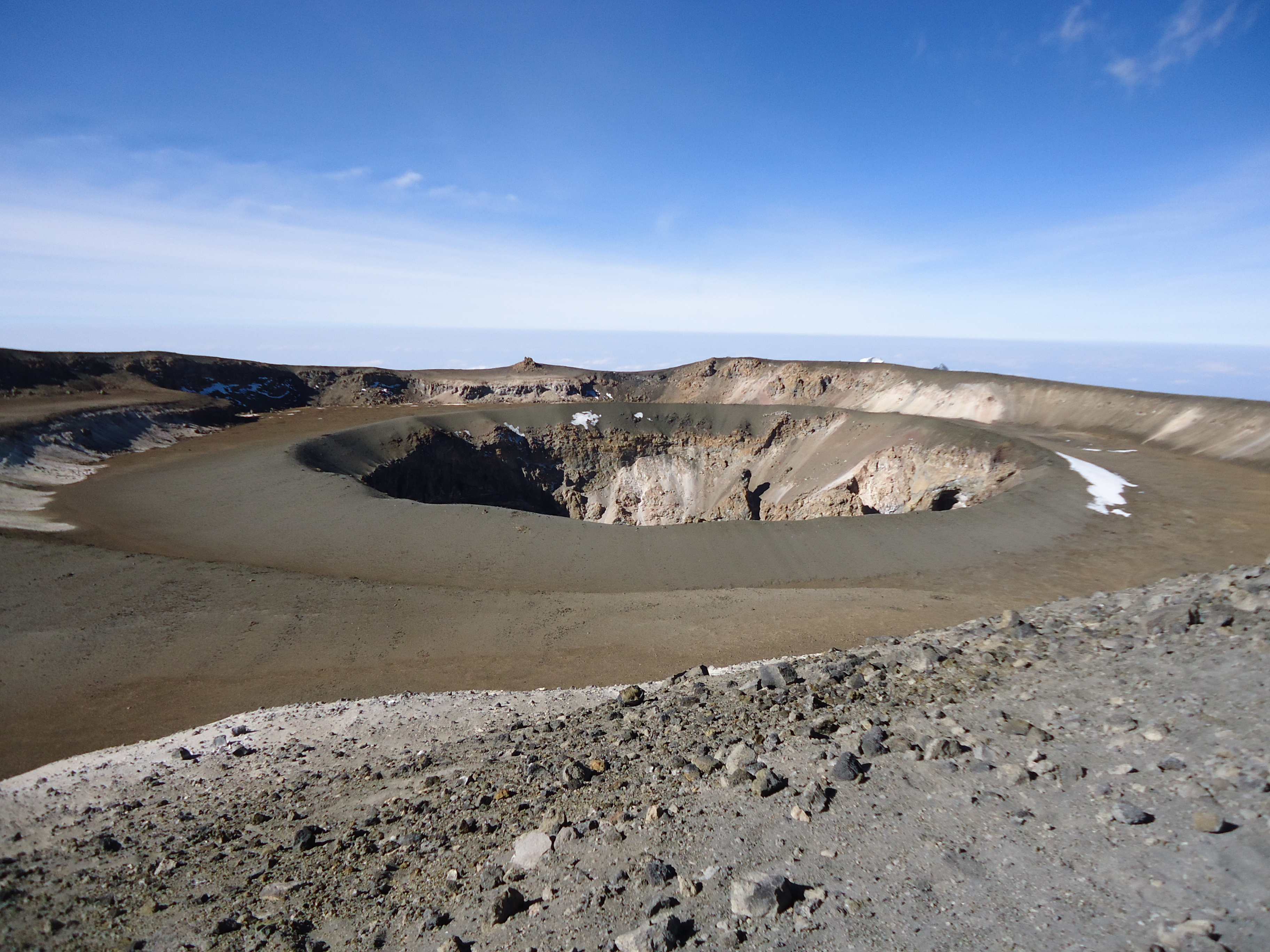 De Reuschkrater van de Kilimanjaro